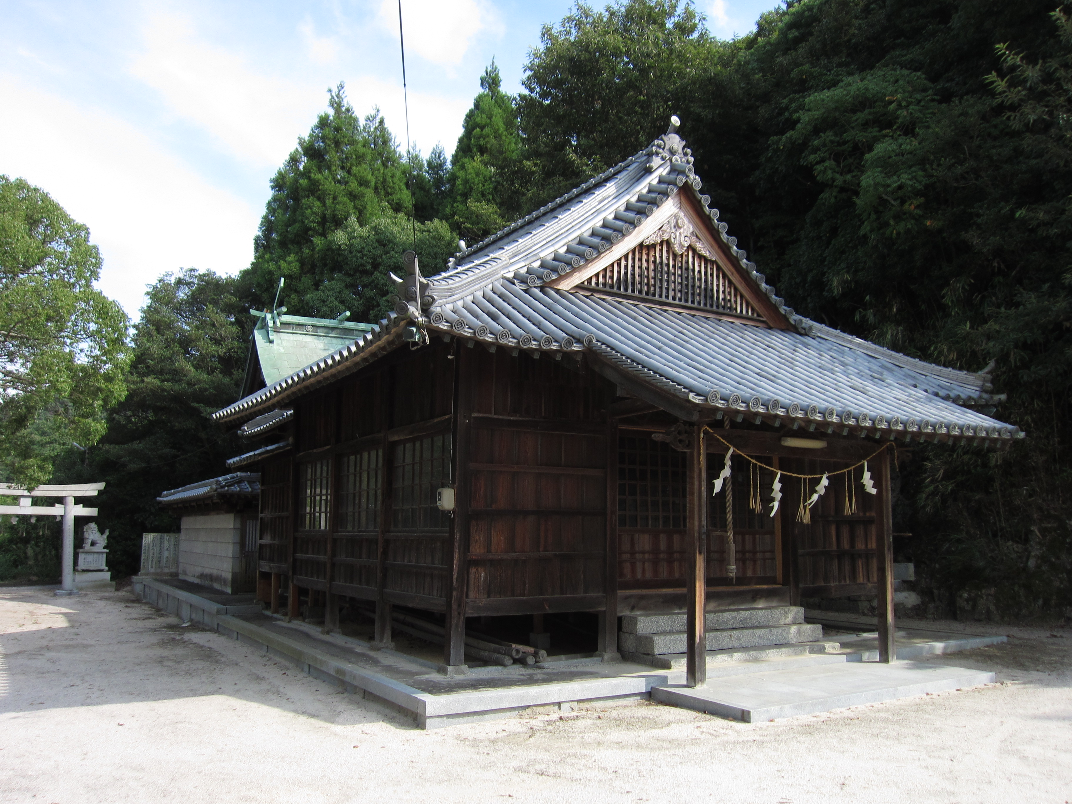 三島神社 (大山祇神社御浜殿)